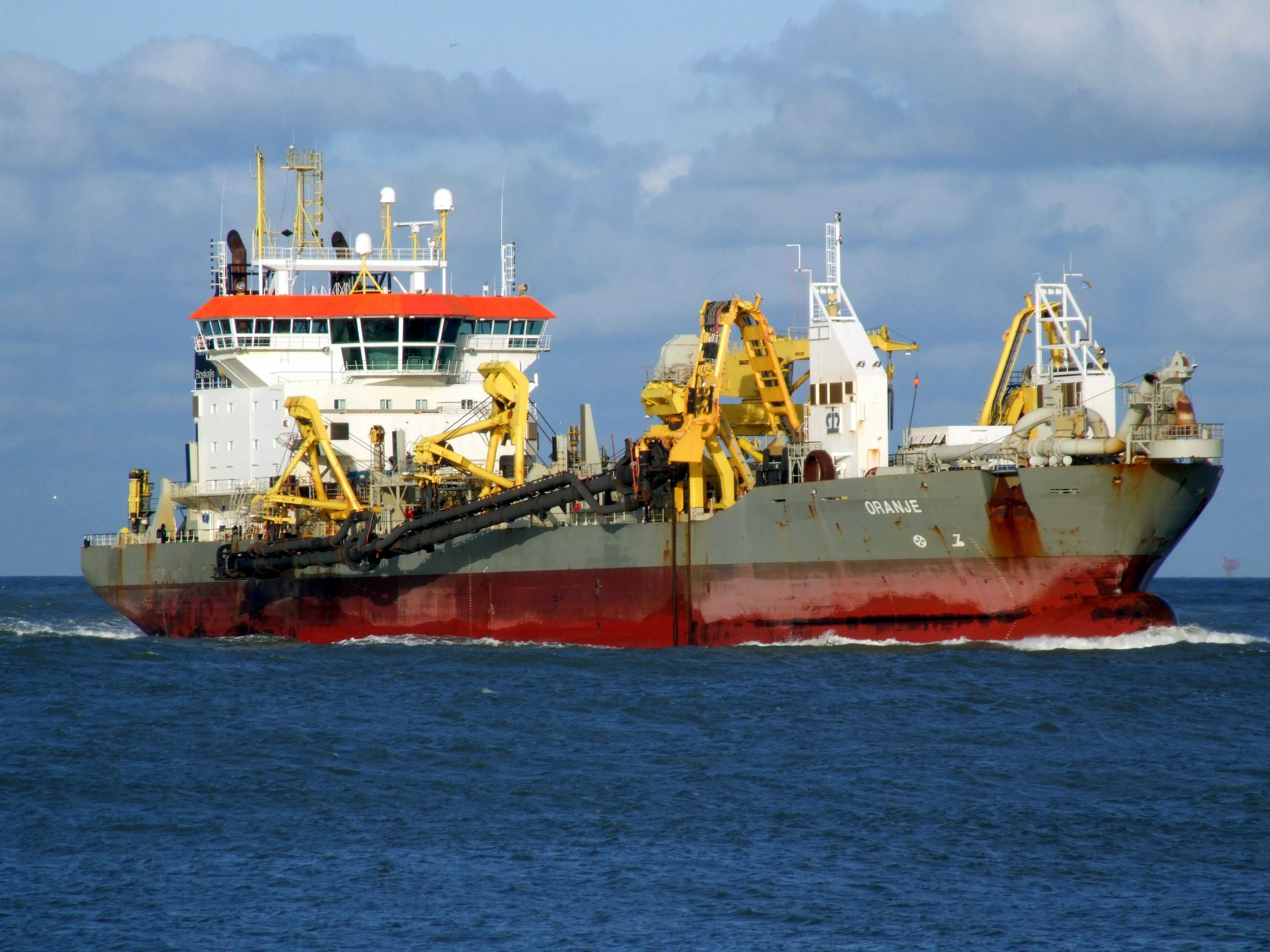 Dredger Oranje near Port of Rotterdam